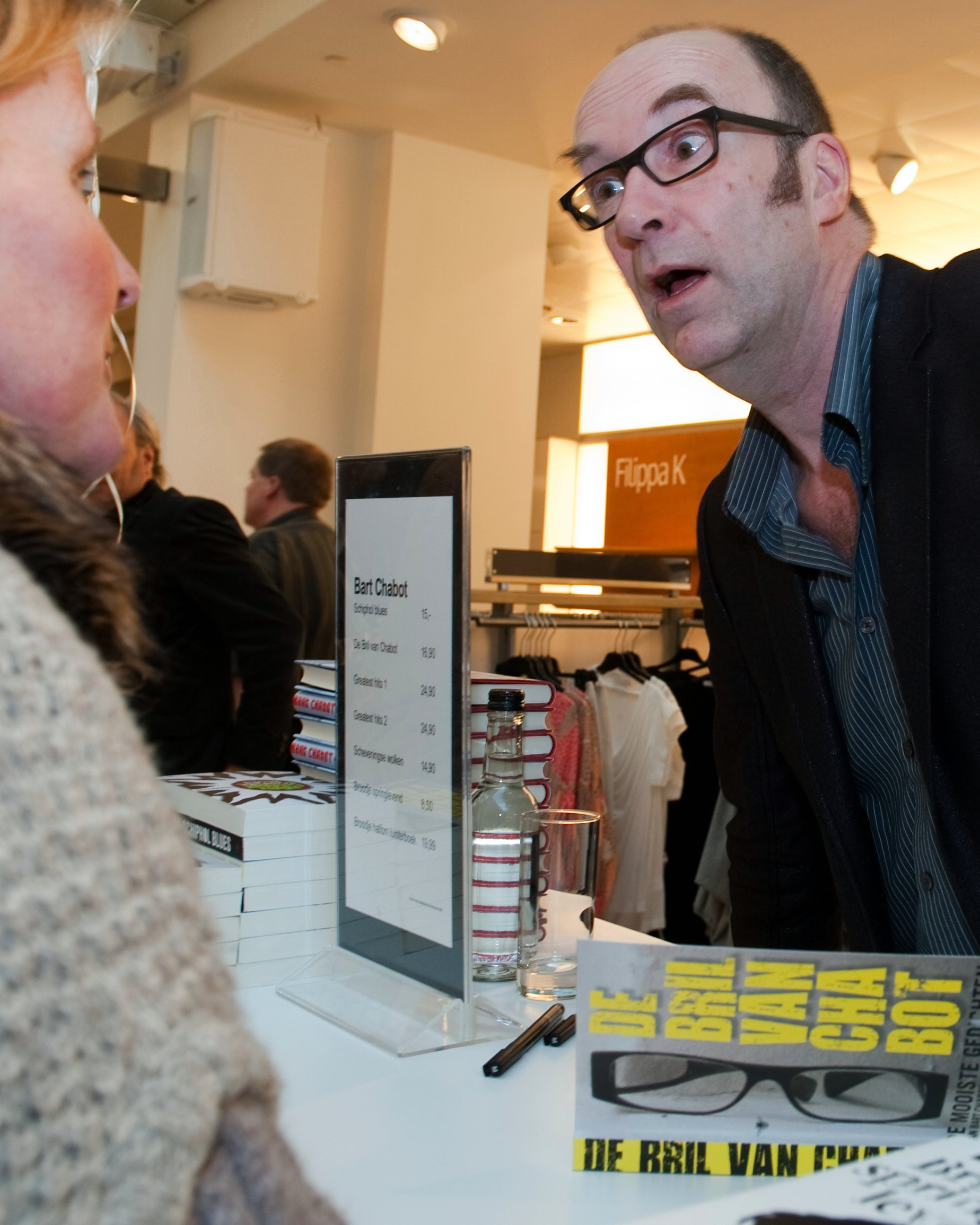 AMSTERDAM - Vlak voor de boekenweek organiseerde de Bijenkorf het feest der letteren. Deelnemende auteurs Bart Chabot - Beau van Erven Dorens – Cees Nooteboom – Charlotte Mutsaers – Eva Posthuma de Boer – Franca Treur – Hanneke Groenteman – Jaap Scholten – Jan Siebelink – Jules Deelder – Lulu Wang – Maarten ’t Hart – Marion Bloem – Marion Pauw – Marjan Berk – Midas Dekkers – Nico Dijkshoorn – Peter van Straaten – Remco Campert – Renate Dorrestein – Robert Vuijsje – Rosita Steenbeek – Simone van der Vlugt – Sophie van der Stap – Stine Jensen